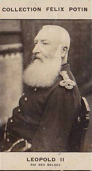 Léopold II, roi des Belges